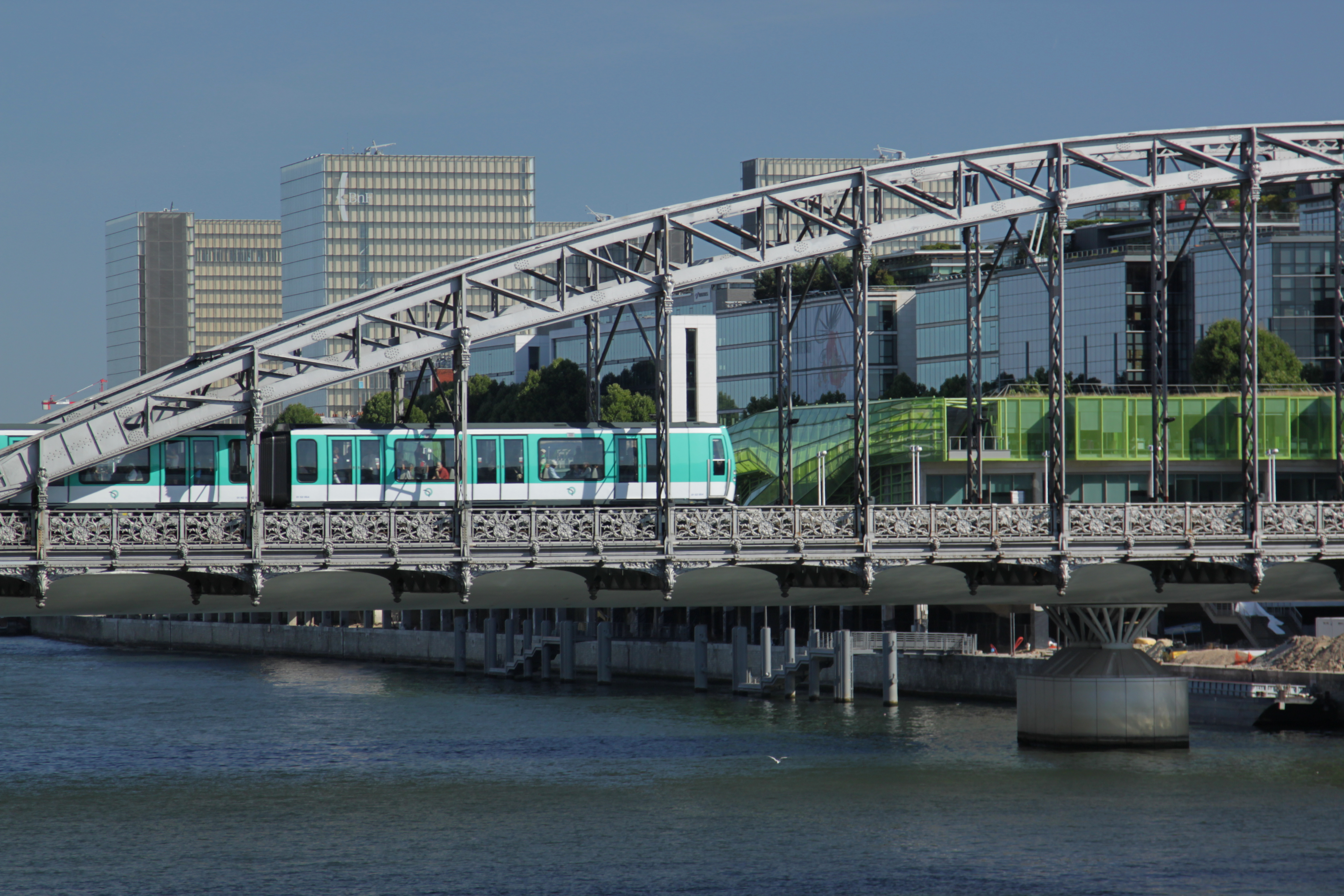 Le MF 01 numéroté 054 sur le pont d'Austerlitz sur la ligne 5 du métro de Paris.